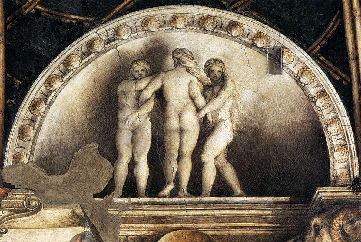 Three Graces Fresco Camera di San Paolo, Parma